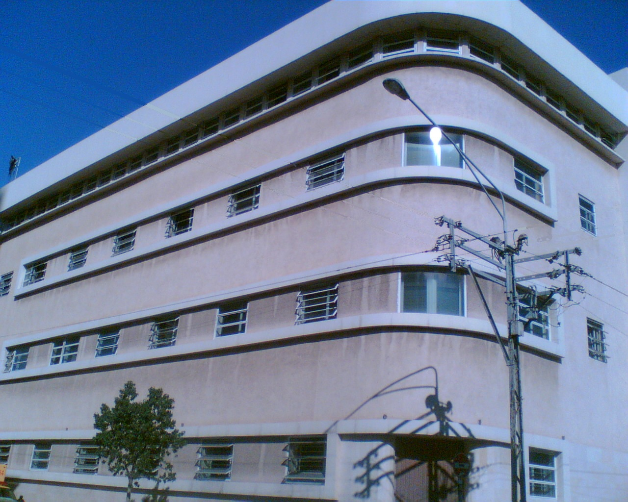 בניין בנק ישראל ברחוב לילינבלום בתל אביב. צילם דוד שי